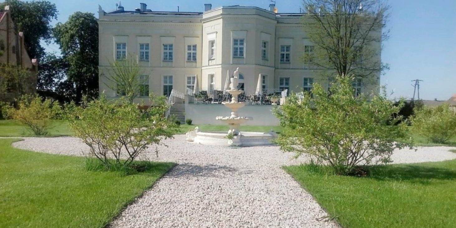 Akacjowy Dwór - Trzebiatów